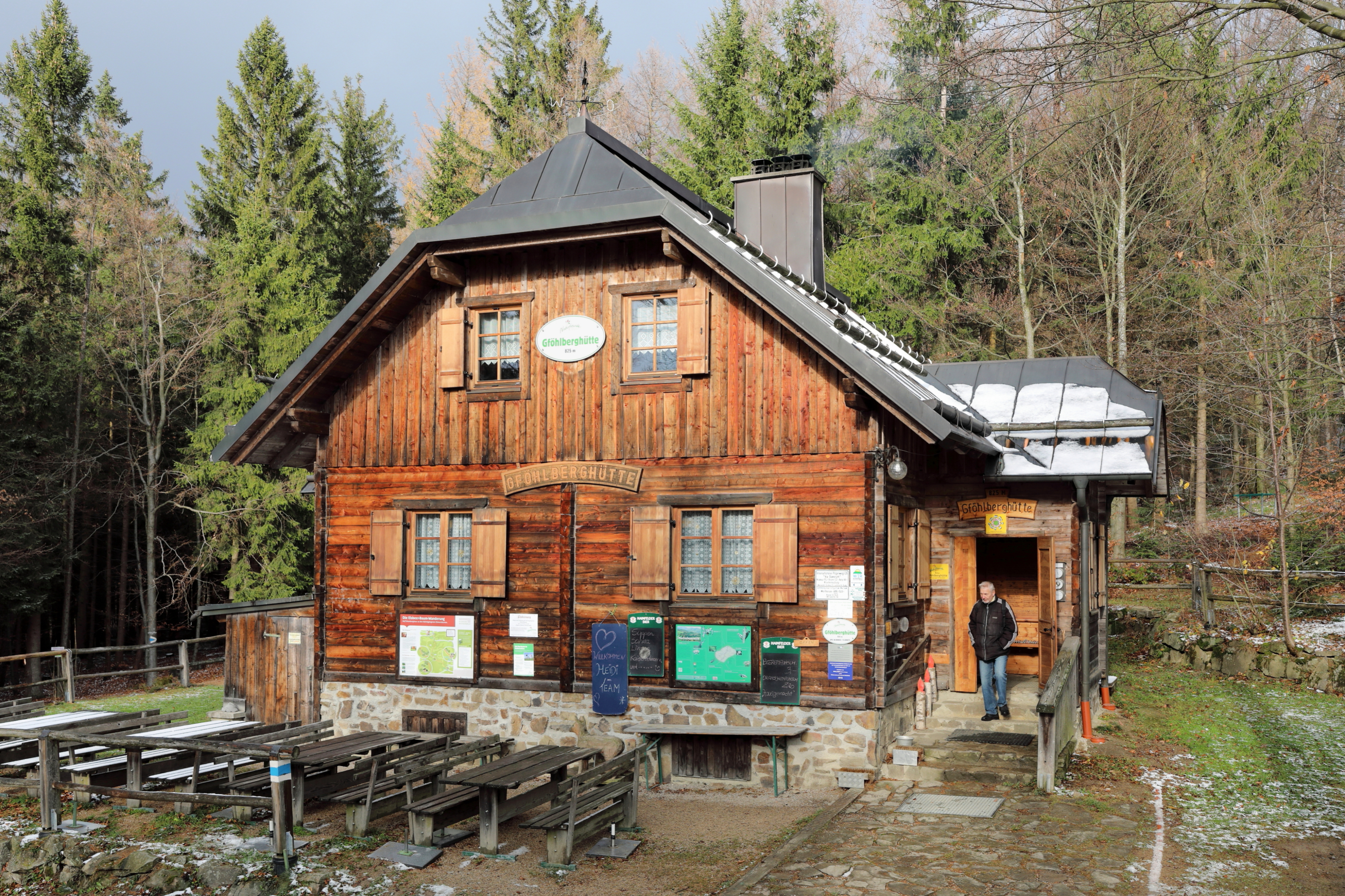 Die Gföhlberghütte im südwestlichen Wienerwald auf dem Gföhlberg und auf dem Gemeindegebiet der niederösterreichischen Stadtgemeinde Hainfeld, sowie direkt an der Gemeindegrenze zu Brand-Laaben.Die Hütte befindet sich auf 825 m Höhe und rund 500 m südlich des Gföhlberggipfels. Sie wurde von den Naturfreunden, Sektion Eichgraben, von 1999 bis 2003 errichtet und ist am Wochenende sowie an Feiertagen ganzjährig bewirtschaftet. Sie bietet auch Nächtigungsmöglichkeiten für 15 Personen gegen Voranmeldung.